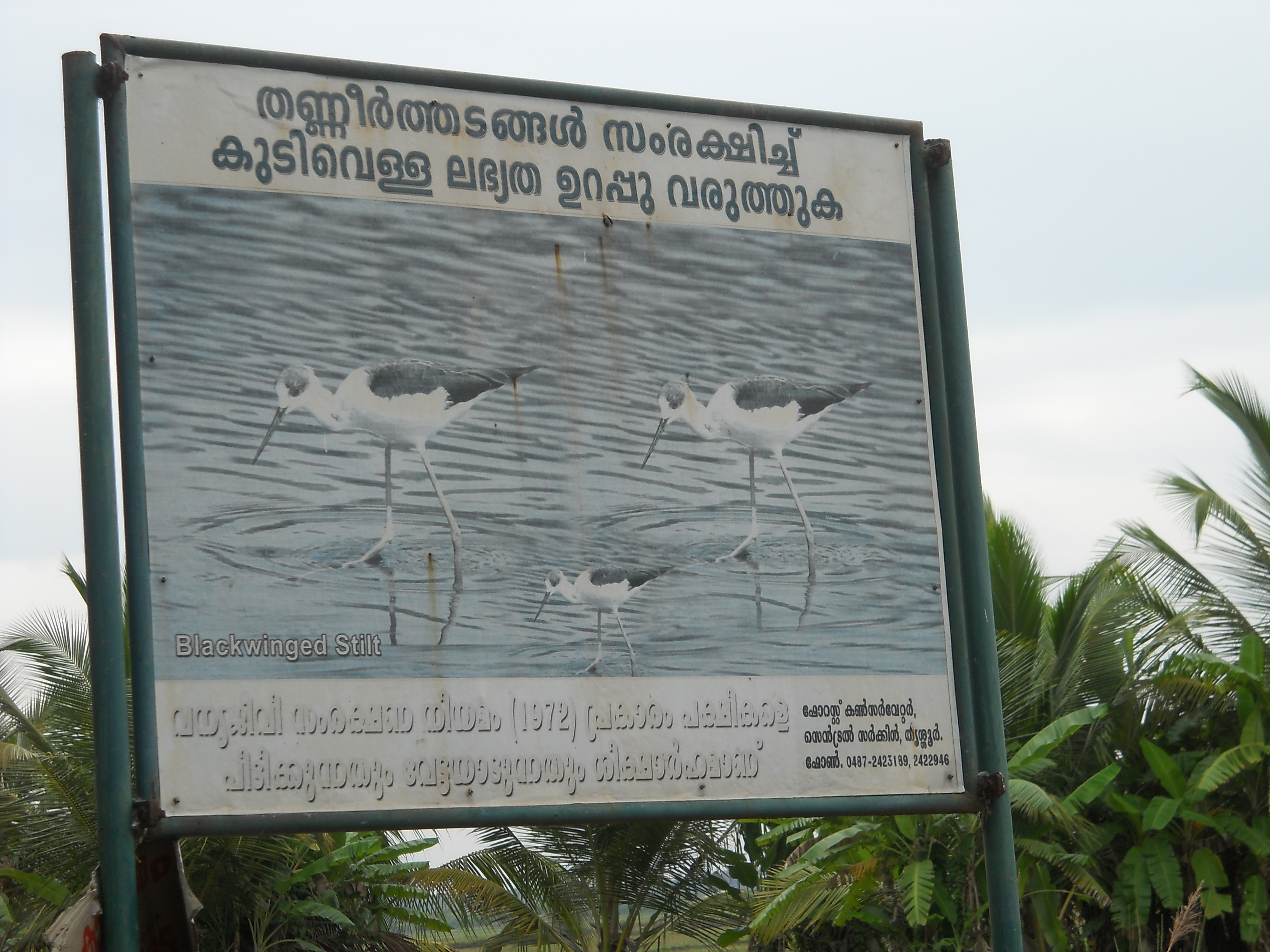 കോൾ പാടങ്ങൾക്ക് സമീപം കാണാവുന്ന ഒരു തണ്ണീര്‍തട സംരക്ഷണ ബോർഡ്, തൃശ്ശൂരിലെ ഒമ്പതുമുറി പാടശേഖരത്തിൽ നിന്നും.